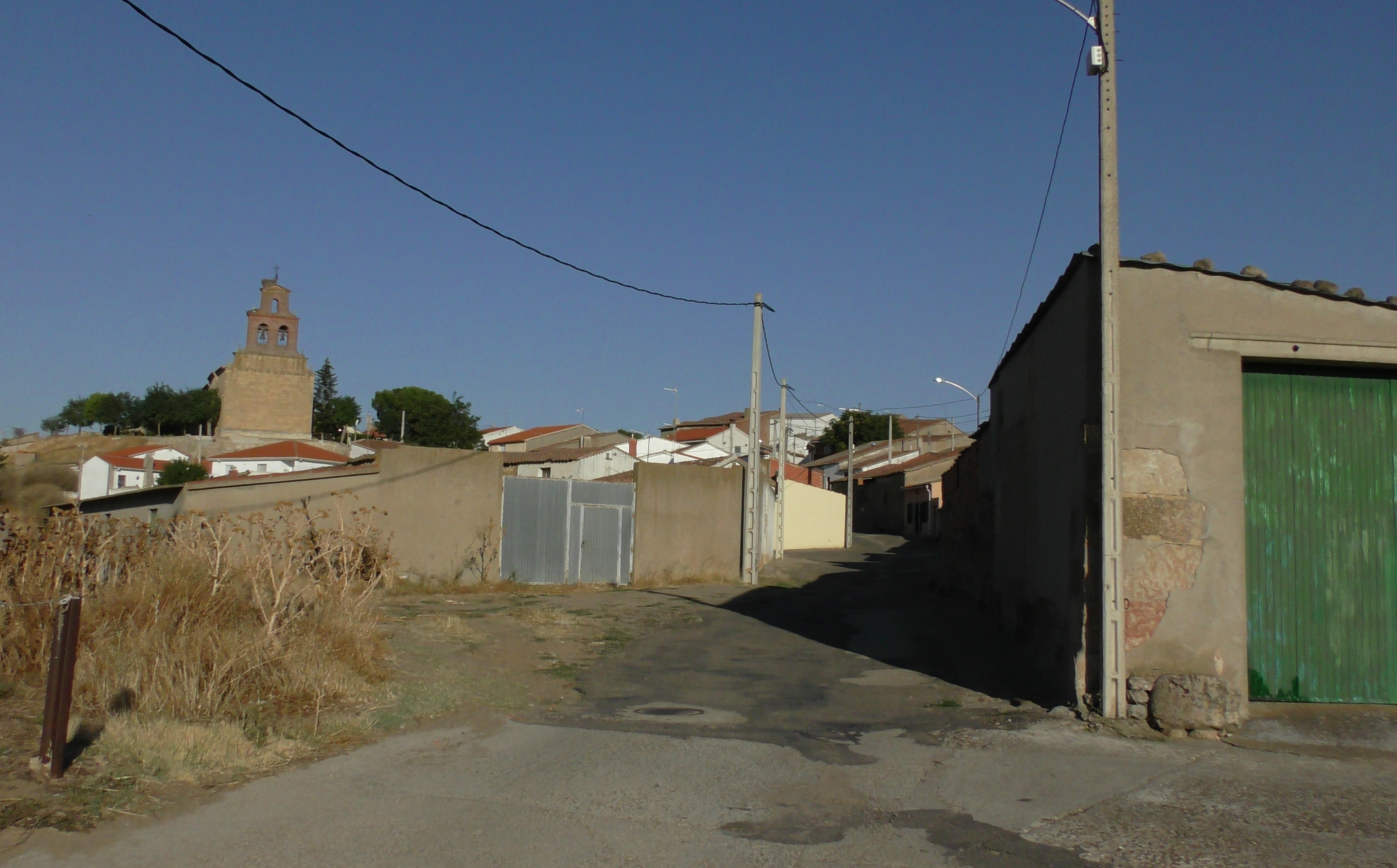 El Piñero